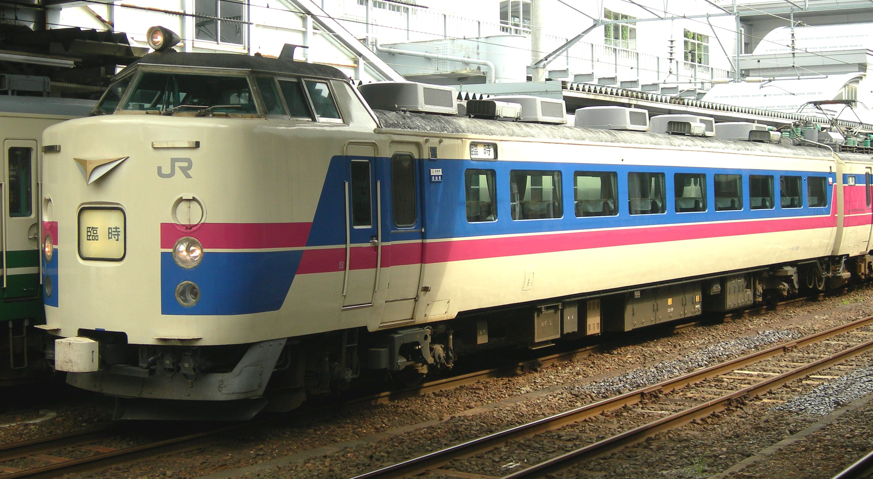 JR東日本 485系